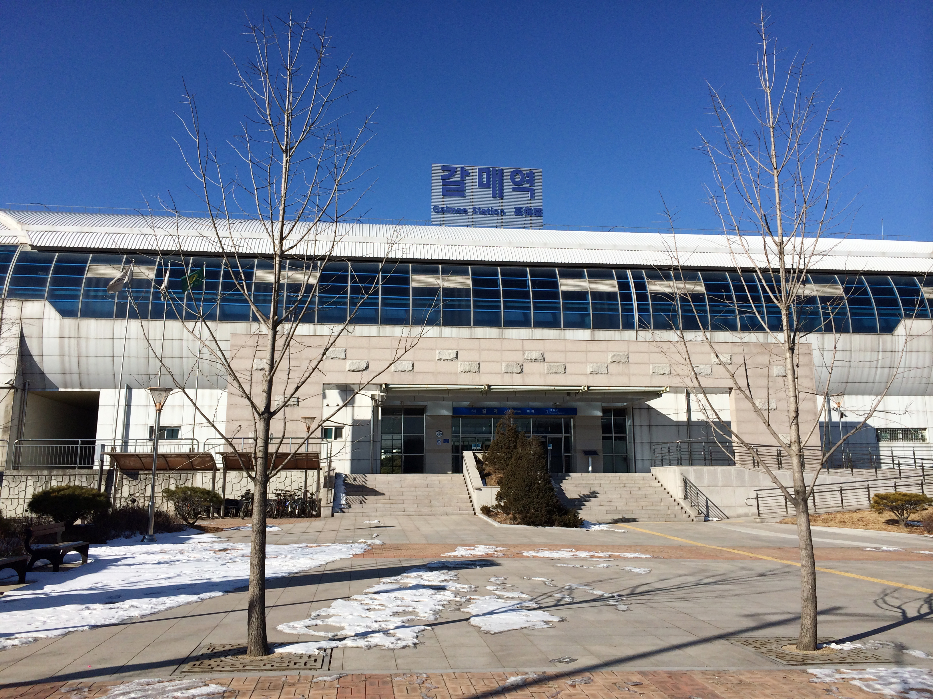 갈매역 역사